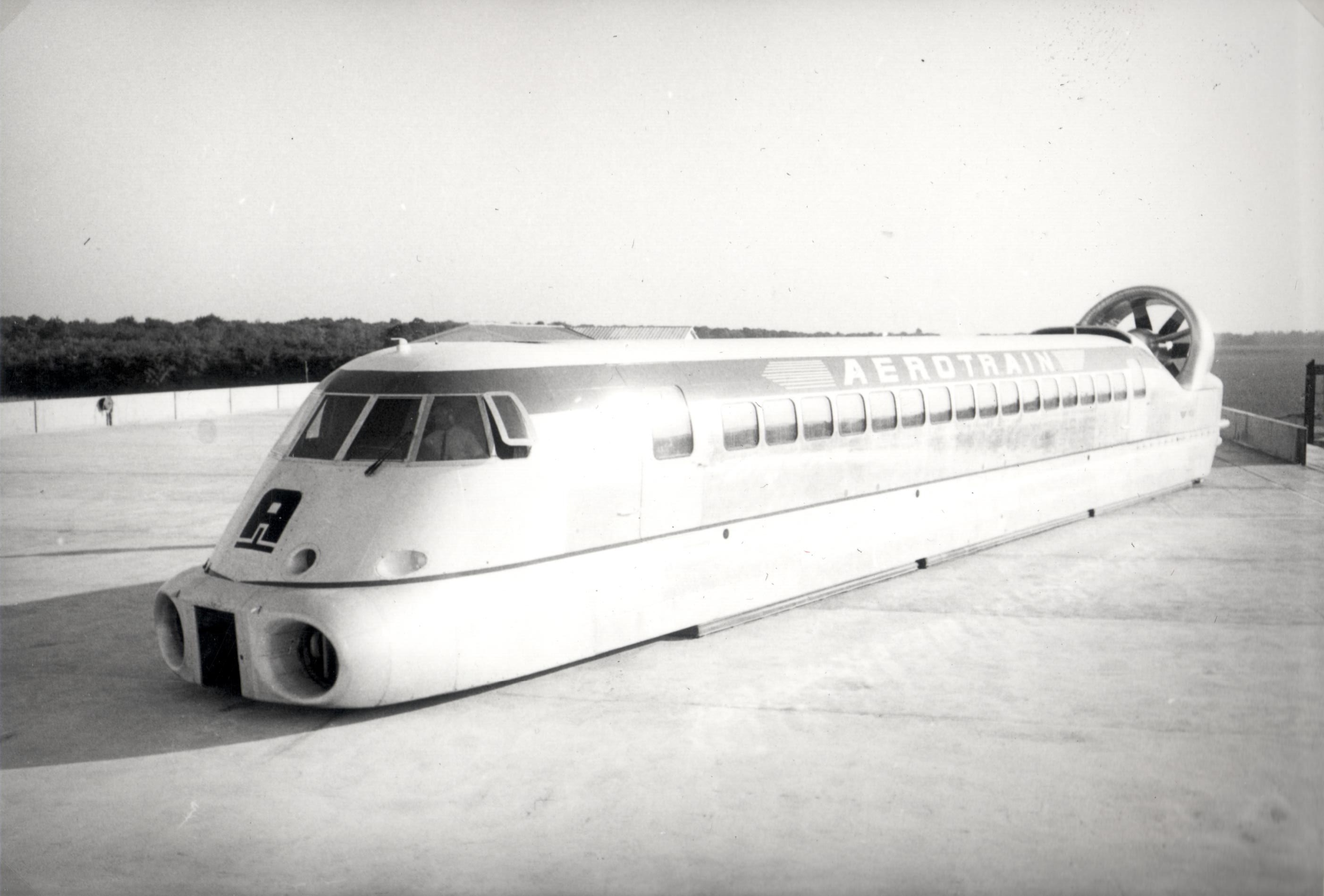 Première mise sur voie